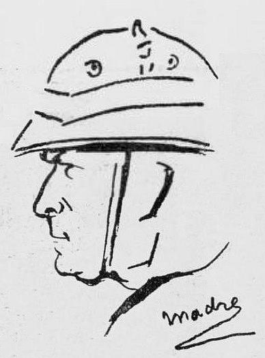 Le comte Jean de Madre en février 1933 (par Wag).